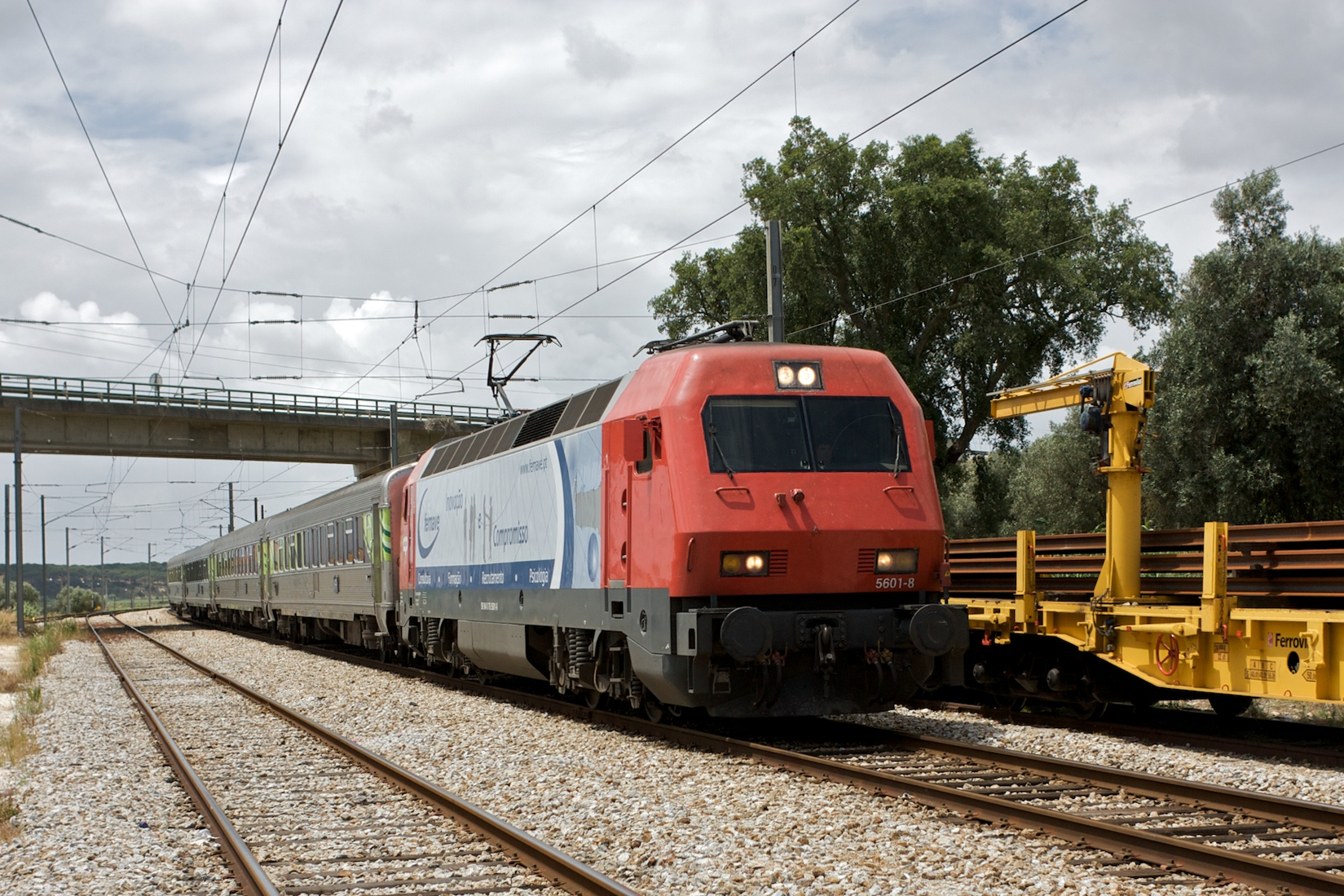 Tipo: Comboio Intercidades 572 [Lisboa • Oriente - Faro] Local: Estação de Alcácer do Sal [Linha do Sul, PK 78] Data e hora: 10 de Junho de 2010 [14h46] Material: Locomotiva 5601 Entroncamento + 4 carruagens Sorefame Renovadas